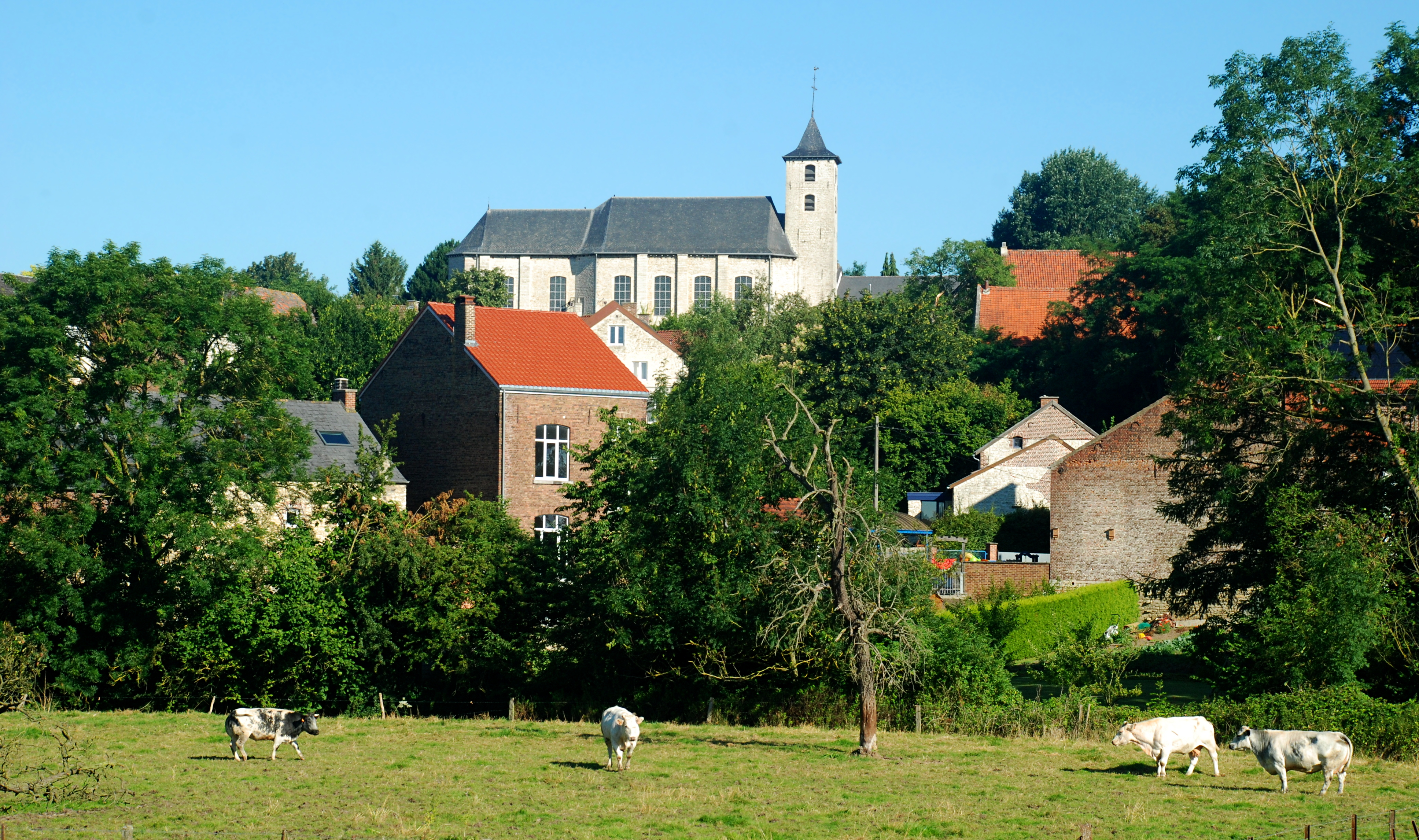 Belgique - Brabant wallon - Jodoigne - Saint-Remy-Geest - Église Saint-Remy